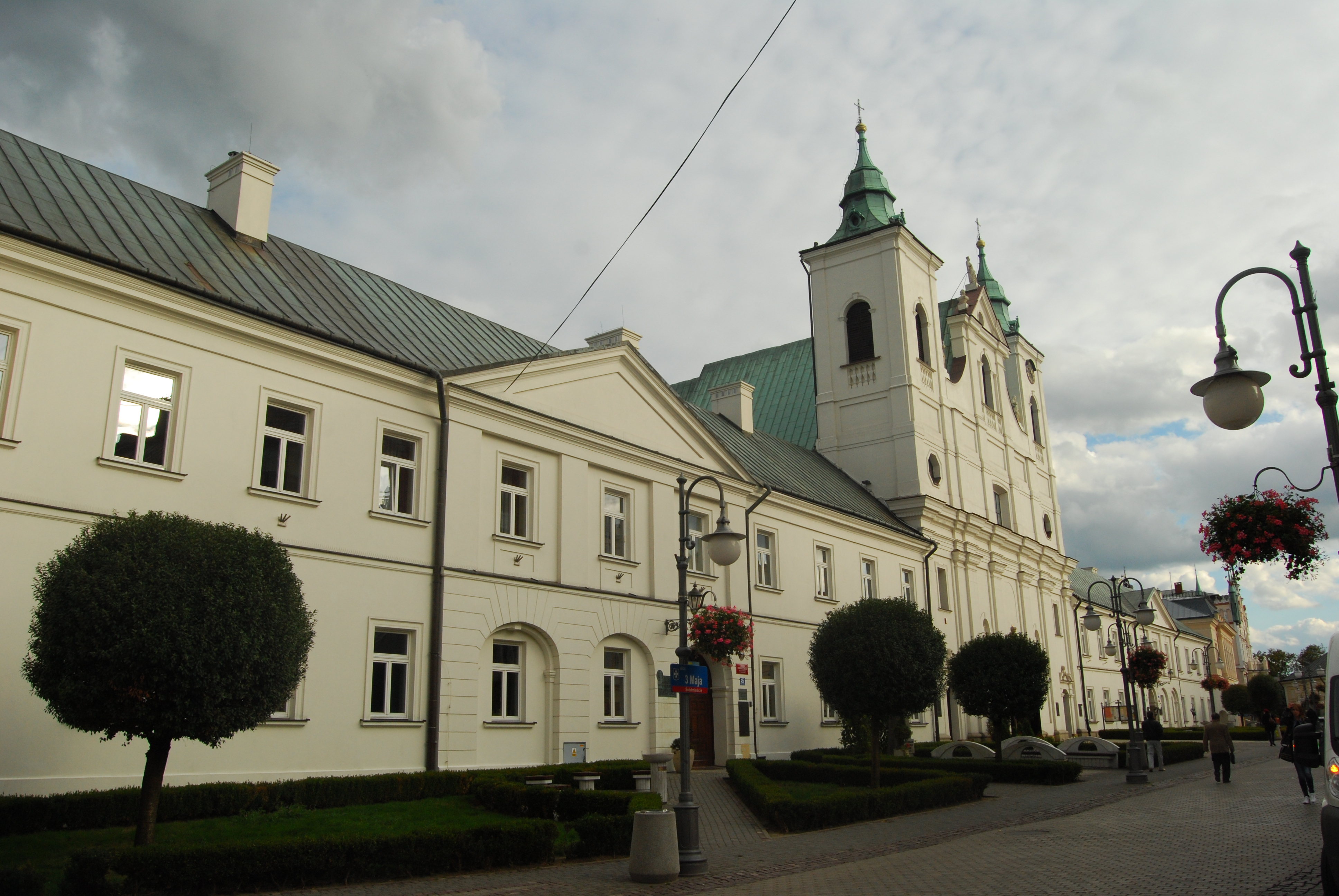 Rzeszów, zespół klasztorny pijarów, 1642-1646, 1703-1707